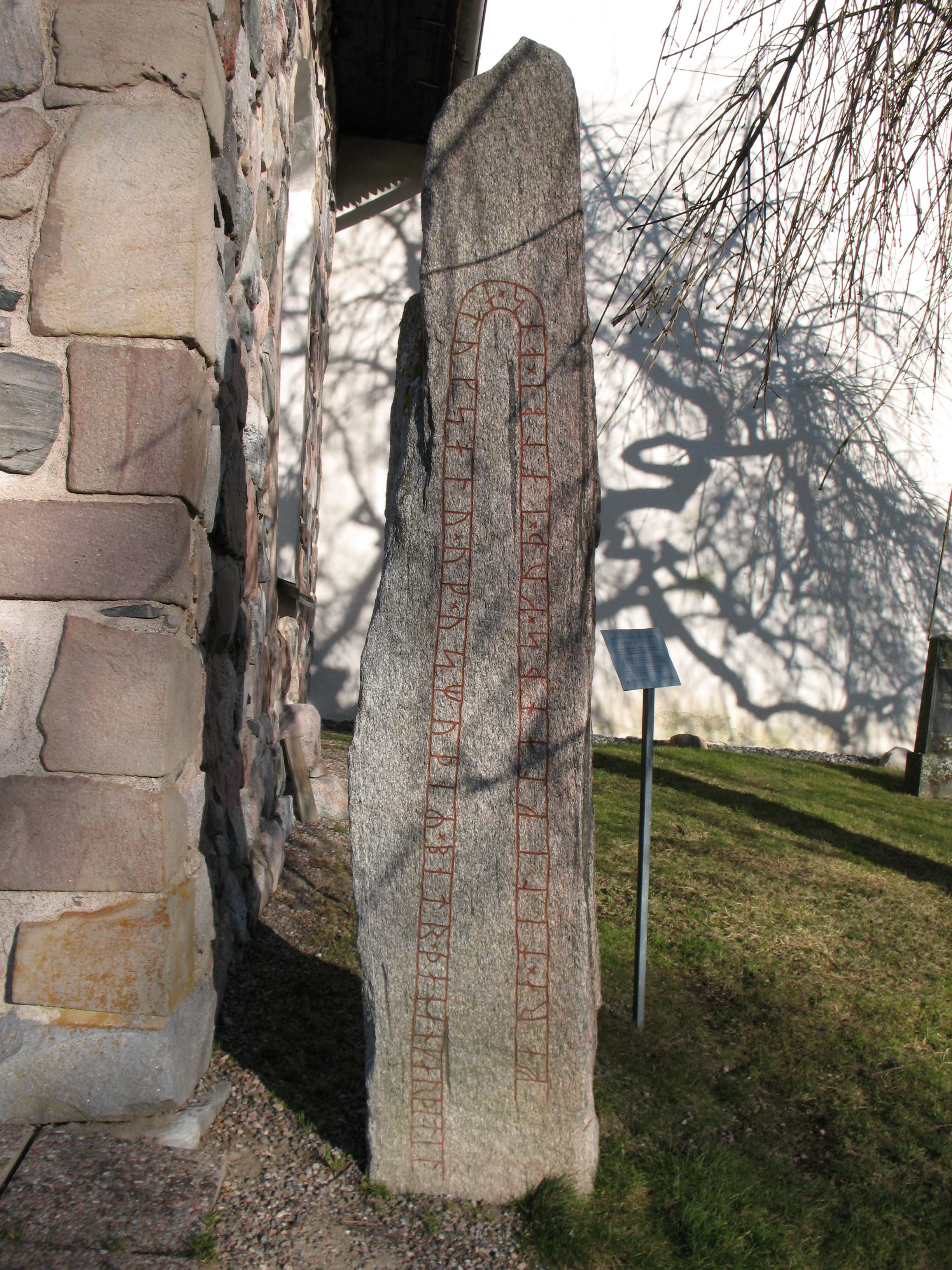 a runestone